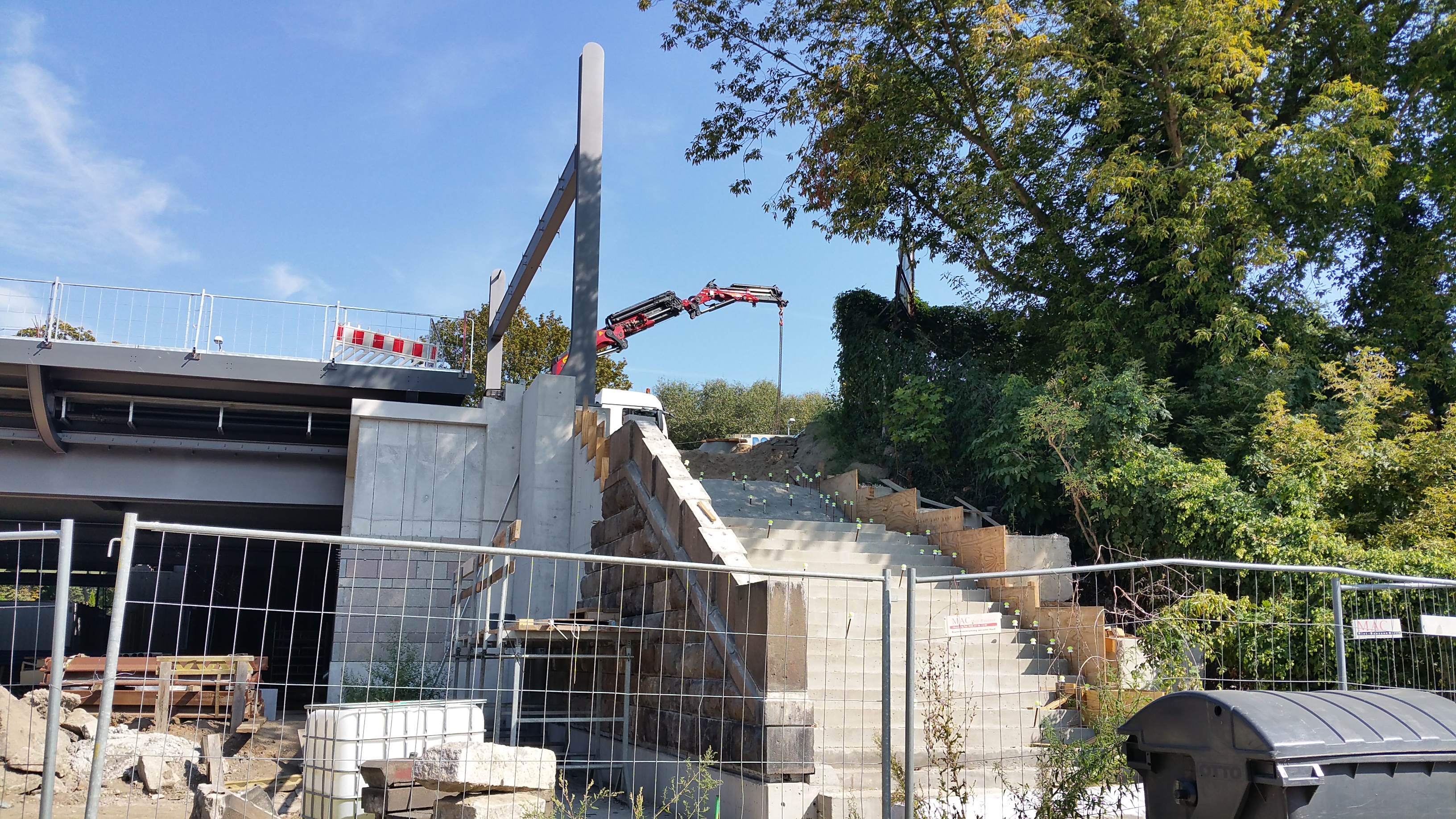 Neue Freibrücke, Bau der Treppe nach historischen Vorbild.